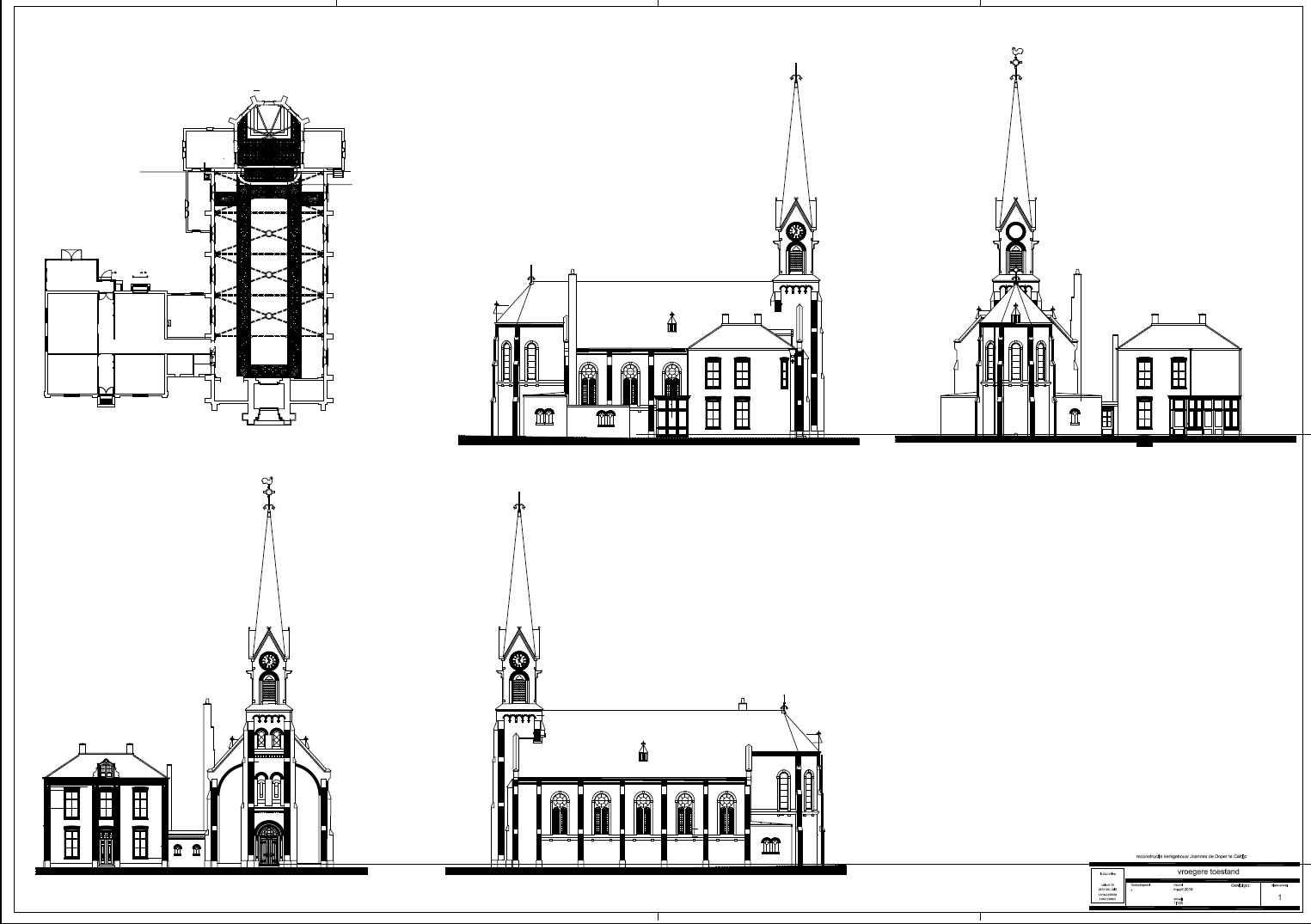 Tekening van de kerk van Catrijp, in 1970 gesloopt. This work is free and may be used by anyone for any purpose. If you wish to use this content, you do not need to request permission as long as you follow any licensing requirements mentioned on this page.